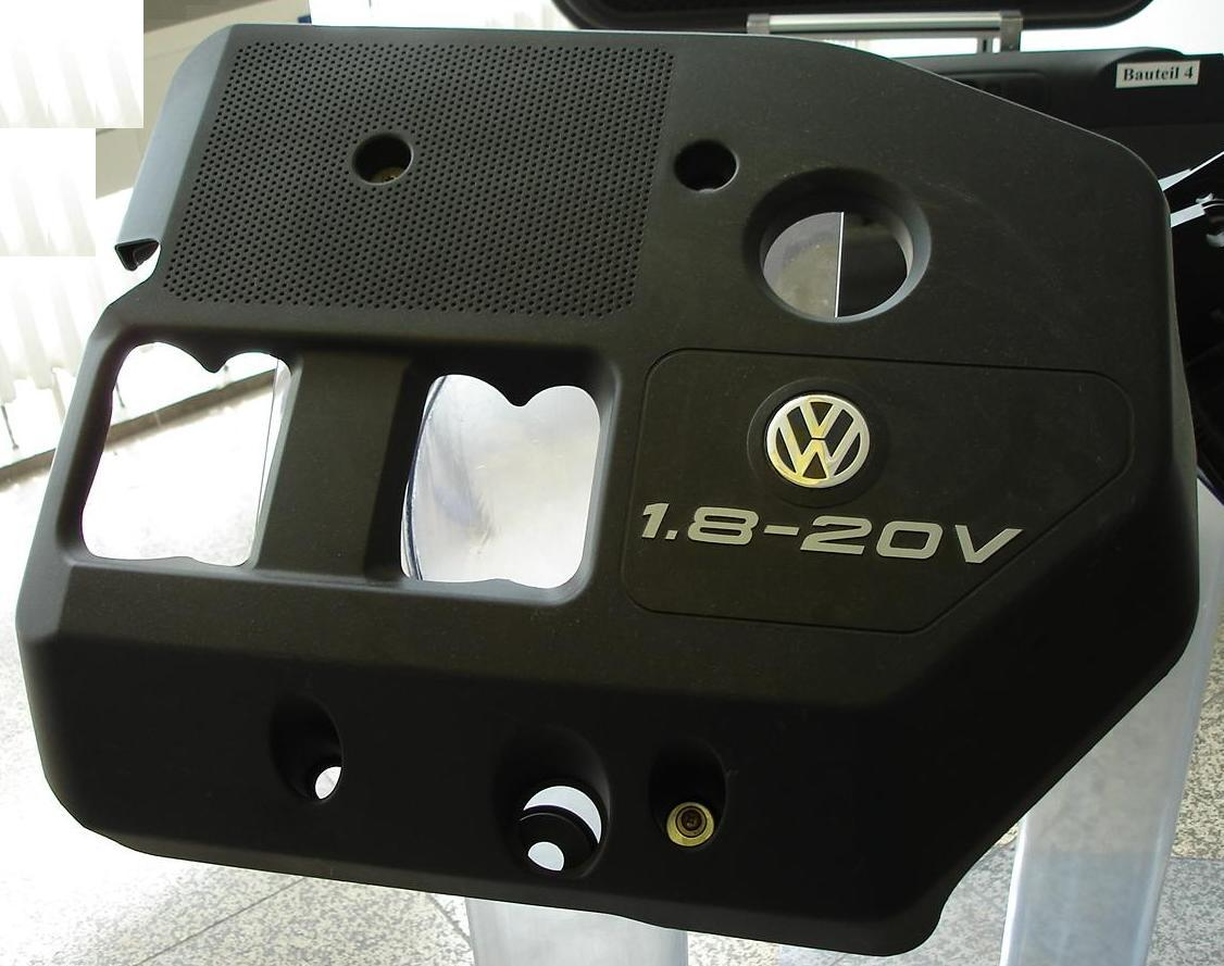 Parte_de_motor Mldeada por inyección